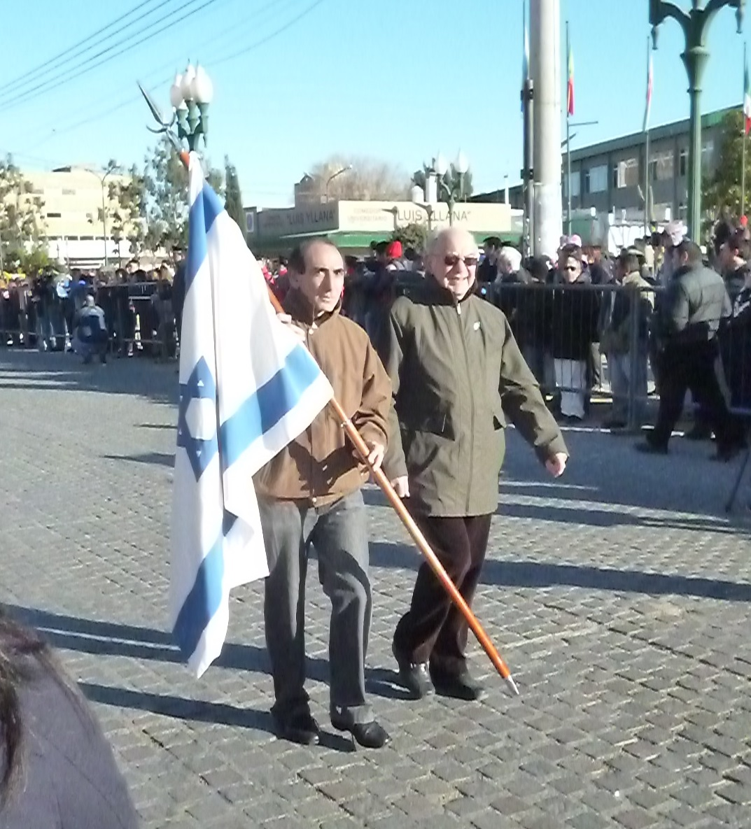 Colectividad judía en Trelew, Argentina